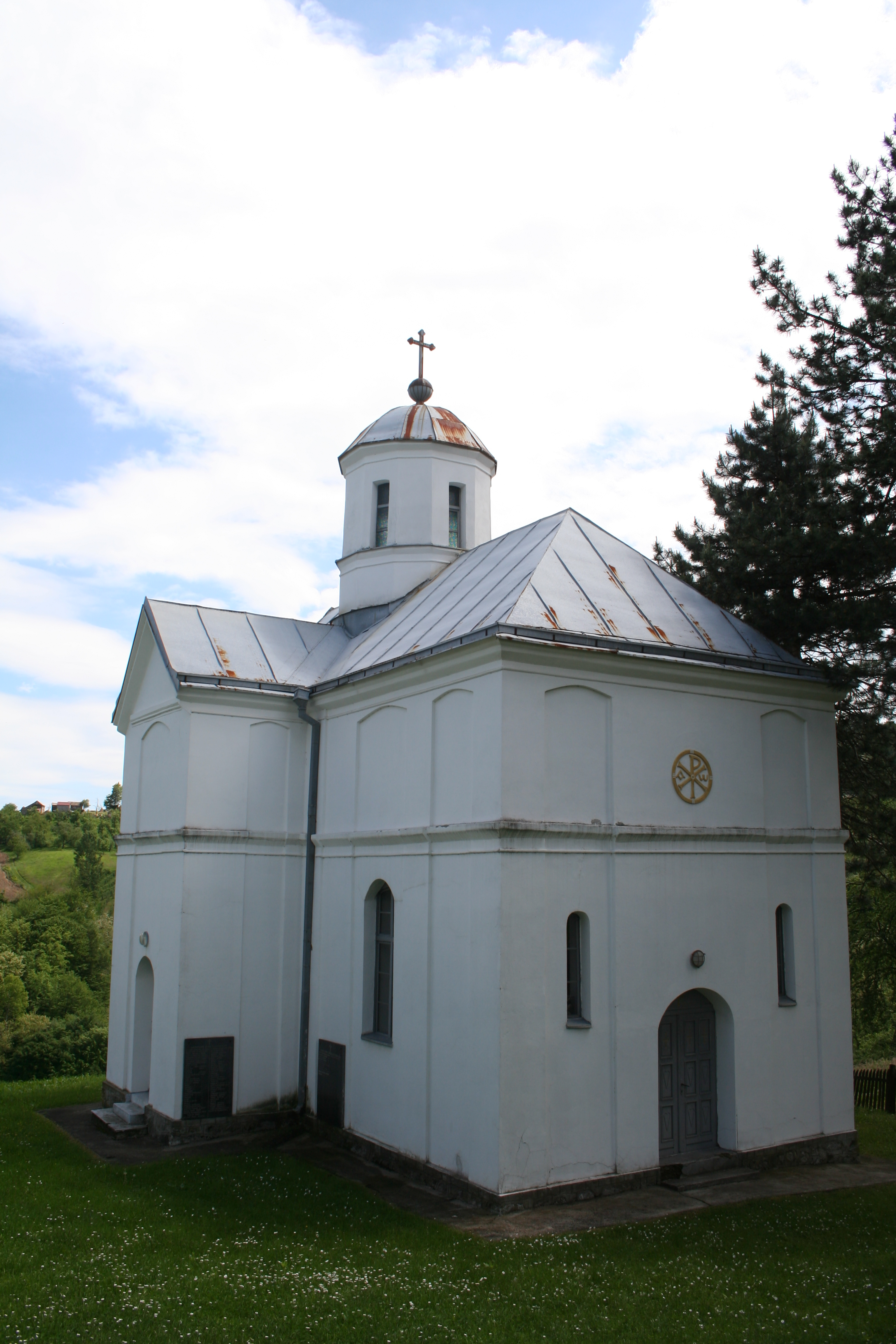 Crkva Sv. Konstantina i Jelene (Vrbić)